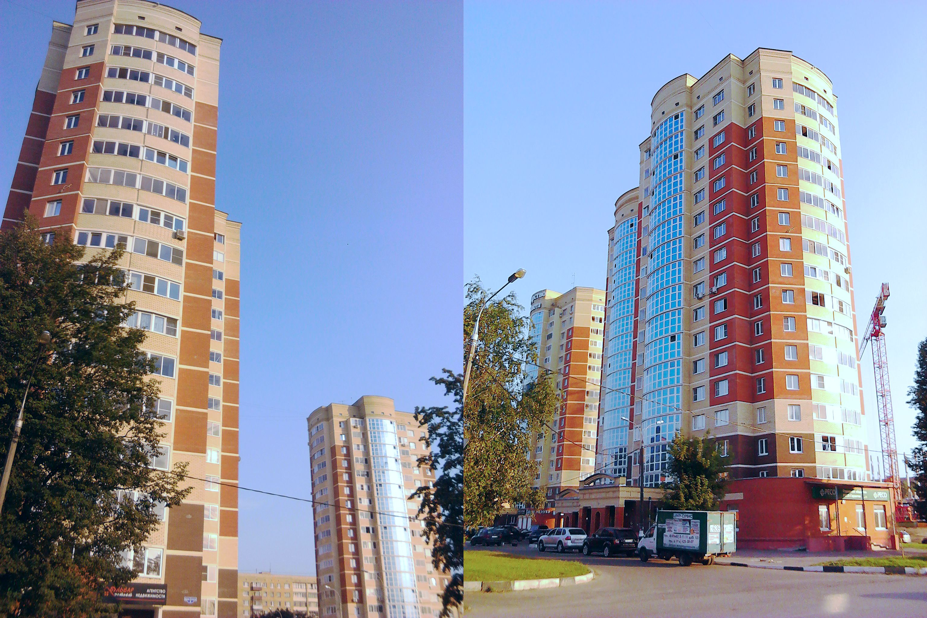 Жилой комплекс "Бриз", г. Орехово-Зуево, август 2013